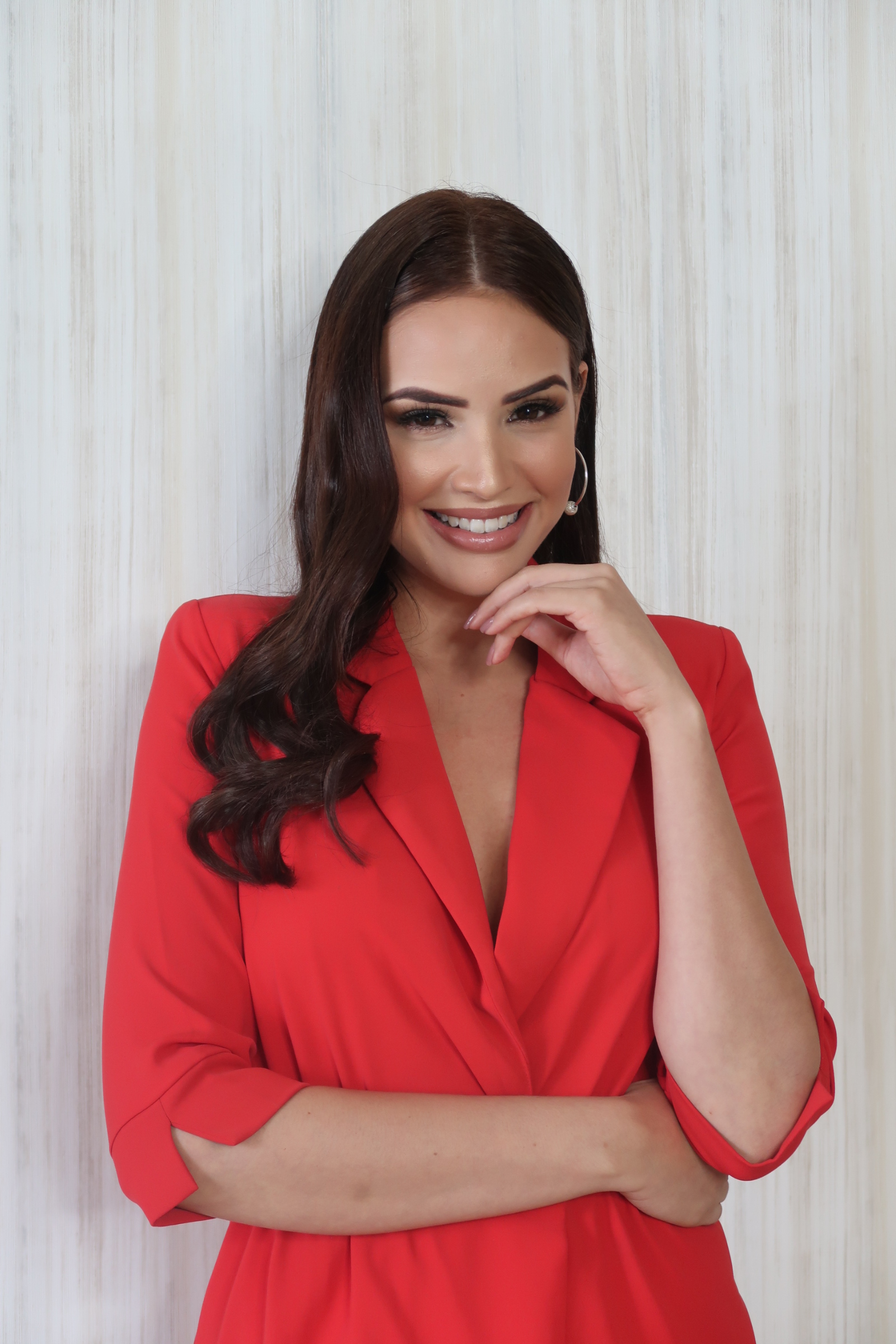 Sheldry Saez